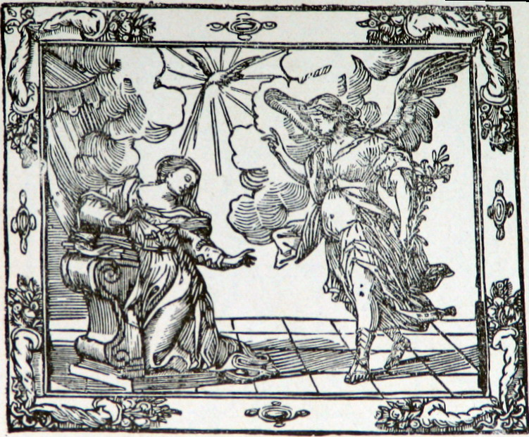 Asti, incisione settecentesca, Confr. Annunziata.